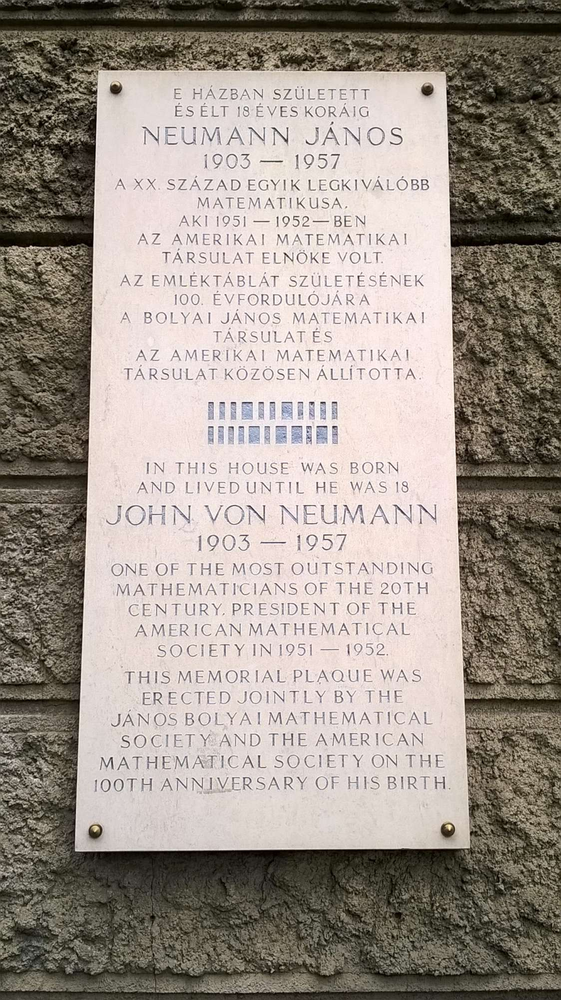 Neumann János emléktábla szülőháza falán, Budapest 5. ker. Báthory u. 26. Állította: Bolyai János Matematikai Társulat és az Amerikai Matematikai Társulat 2003-ban. A tábla felirata magyarul és angolul olvasható: E házban született és élt 18 éves koráig Neumann János (1903-1957), a XX. század egyik legkiválóbb matematikusa, aki 1951-1952-ben az Amerikai Matematikai Társulat elnöke volt. Az emléktáblát születésének 100. évfordulójára a Bolyai János Matematikai Társulat és az Amerikai Matematikai Társulat közösen állította. In this house was born and lived until he was 18 John von Neumann (1903-1957), one of the most outstanding mathematicians of the 20th century. President of the American Mathematical Society in 1951-1952. This memorial plaque was erected jointly by the Janos Bolyai Mathematical Society and the American Mathematical Society on the 100th anniversary of his birth.